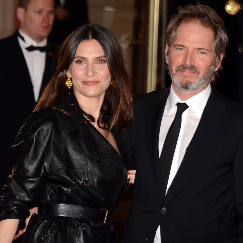 Géraldine Pailhas et Christopher Thompson à la cérémonie des César